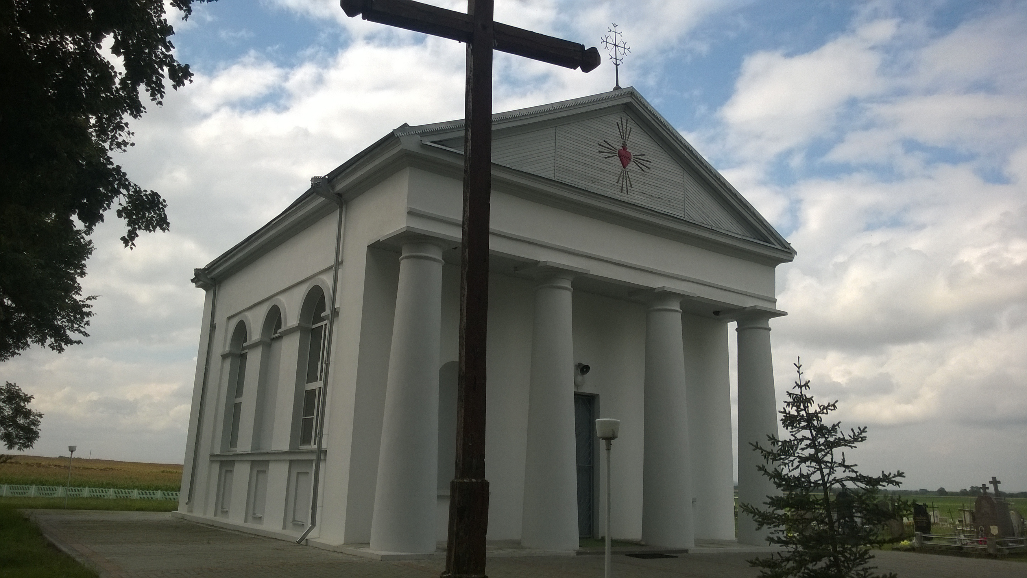 Grodna District, Belarus